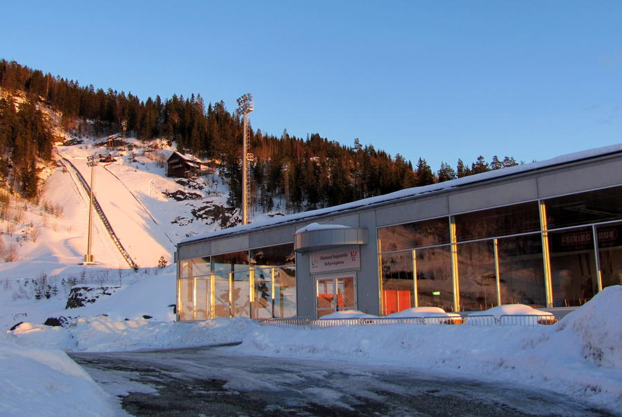 Skiflyvningskroa og storbakken (K105) i Vikersund Hoppsenter, Modum kommune, Buskerud fylke, Norge